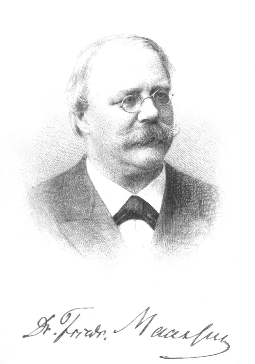 Friedrich Maassen (1823–1899)